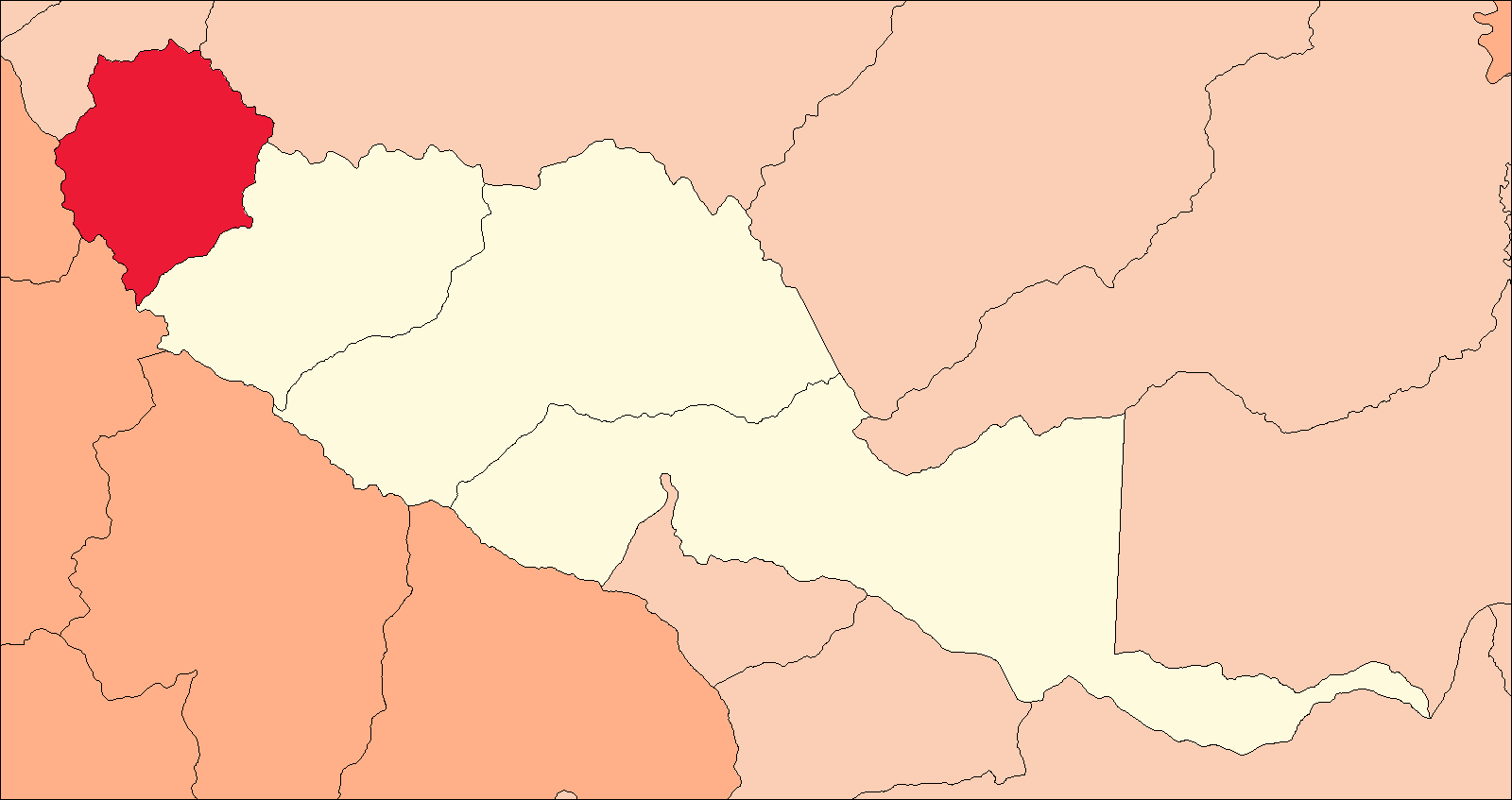 Área del distrito de Canchabamba.